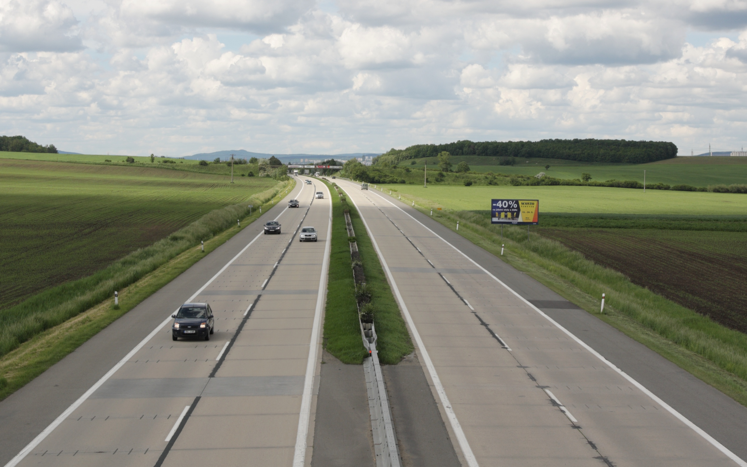 Pohled na dálnici D2 z mostu mimoúrovňové křižovatky u Blučiny. Pohled směrem k Brnu.